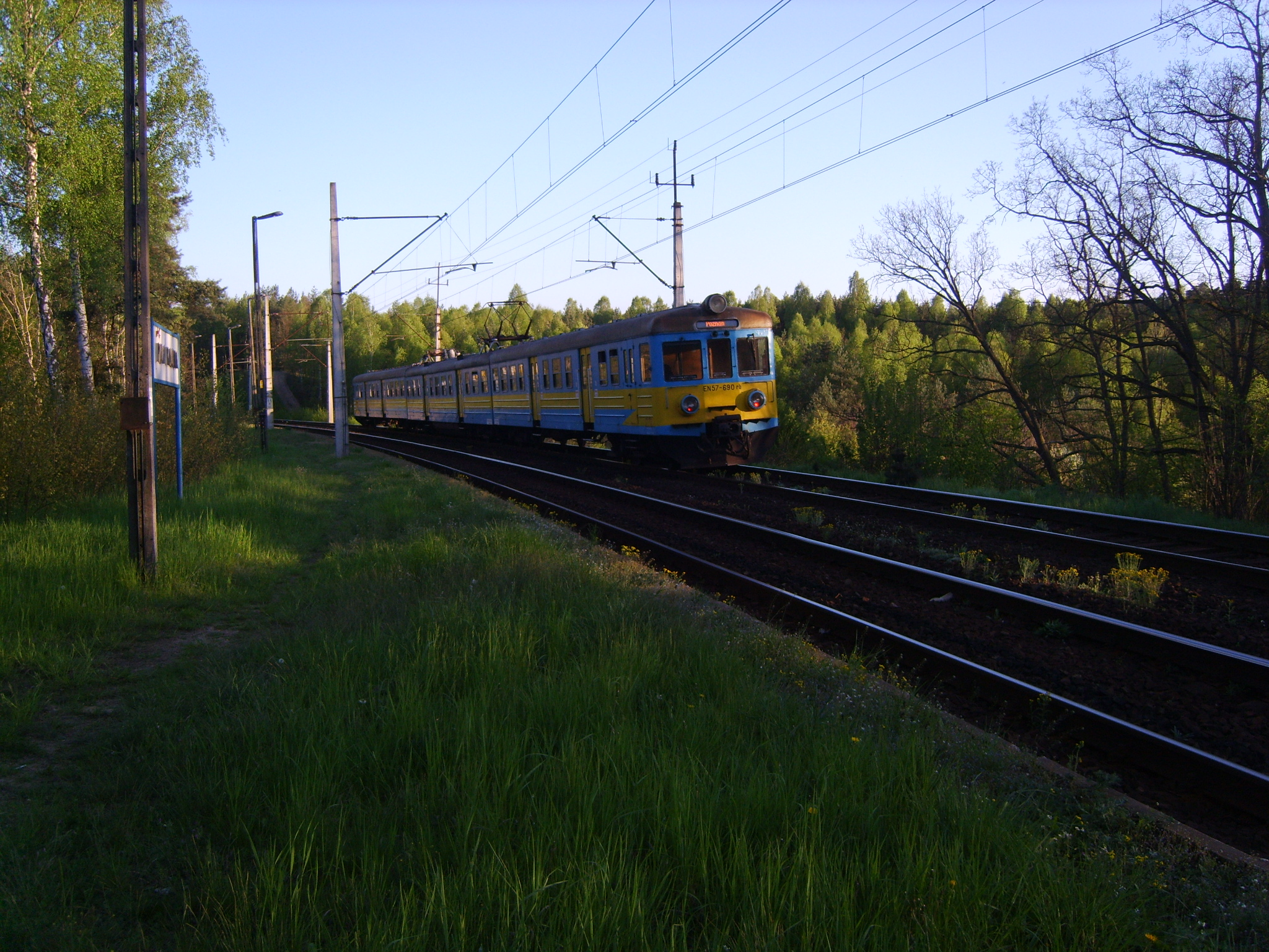 Pociąg jadący do Poznania.